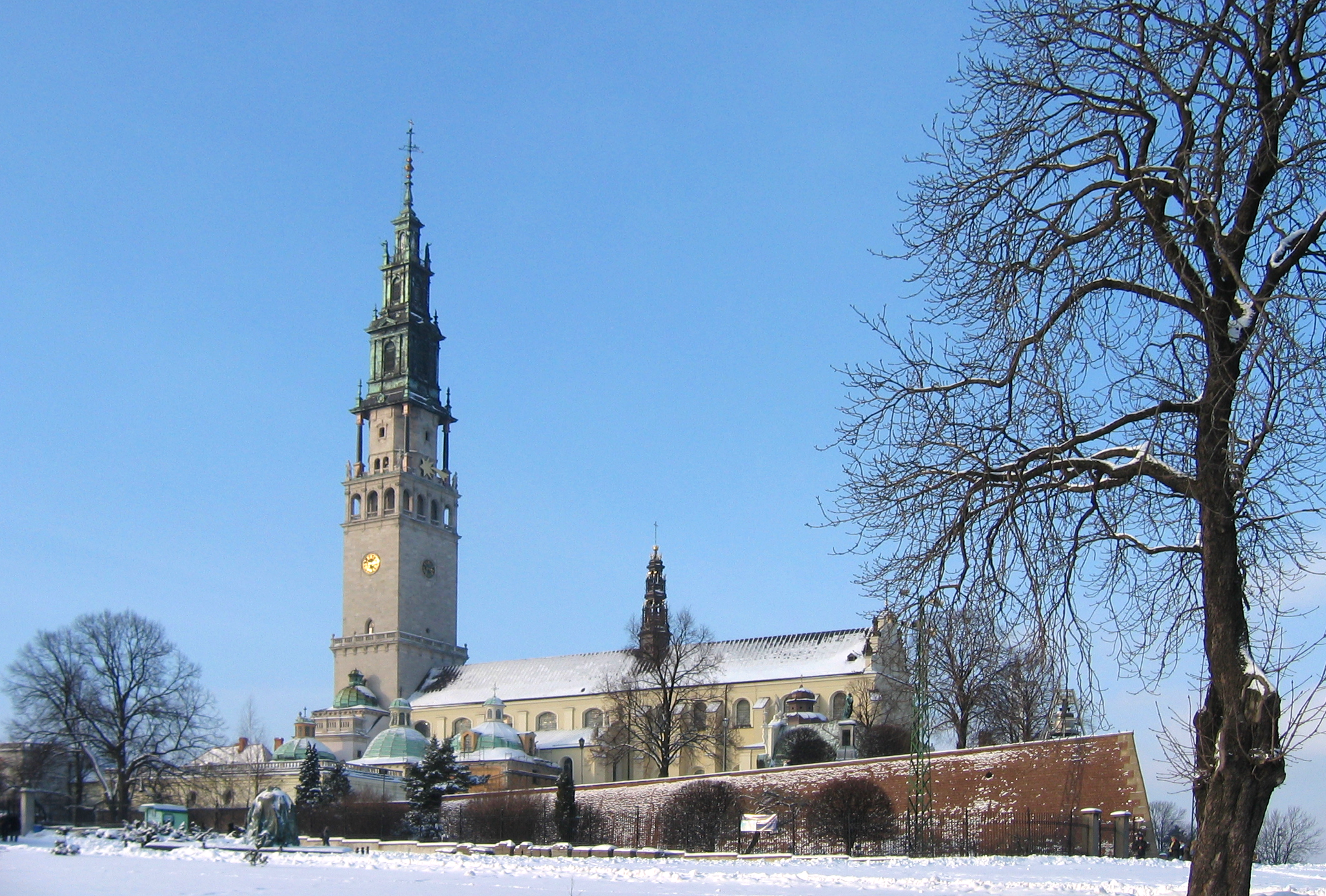 Jasna Góra monastery in Częstochowa, Poland